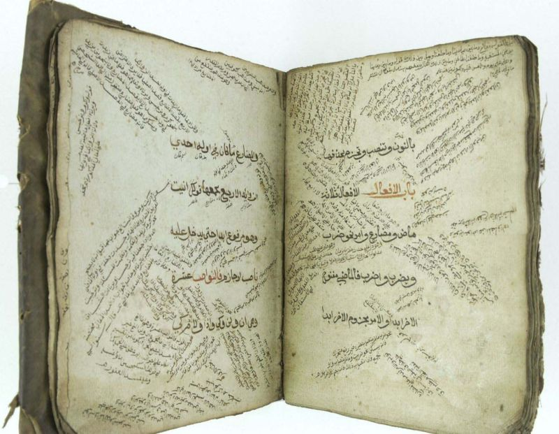 Boek. Vermoedelijk om te onderwijzen in fiqh (Indonesisch: pikah), de jurisprudentie van het islamitisch recht. Handgeschreven religieus boek in Arabisch schrift, vermoedelijk een fiqh-boek